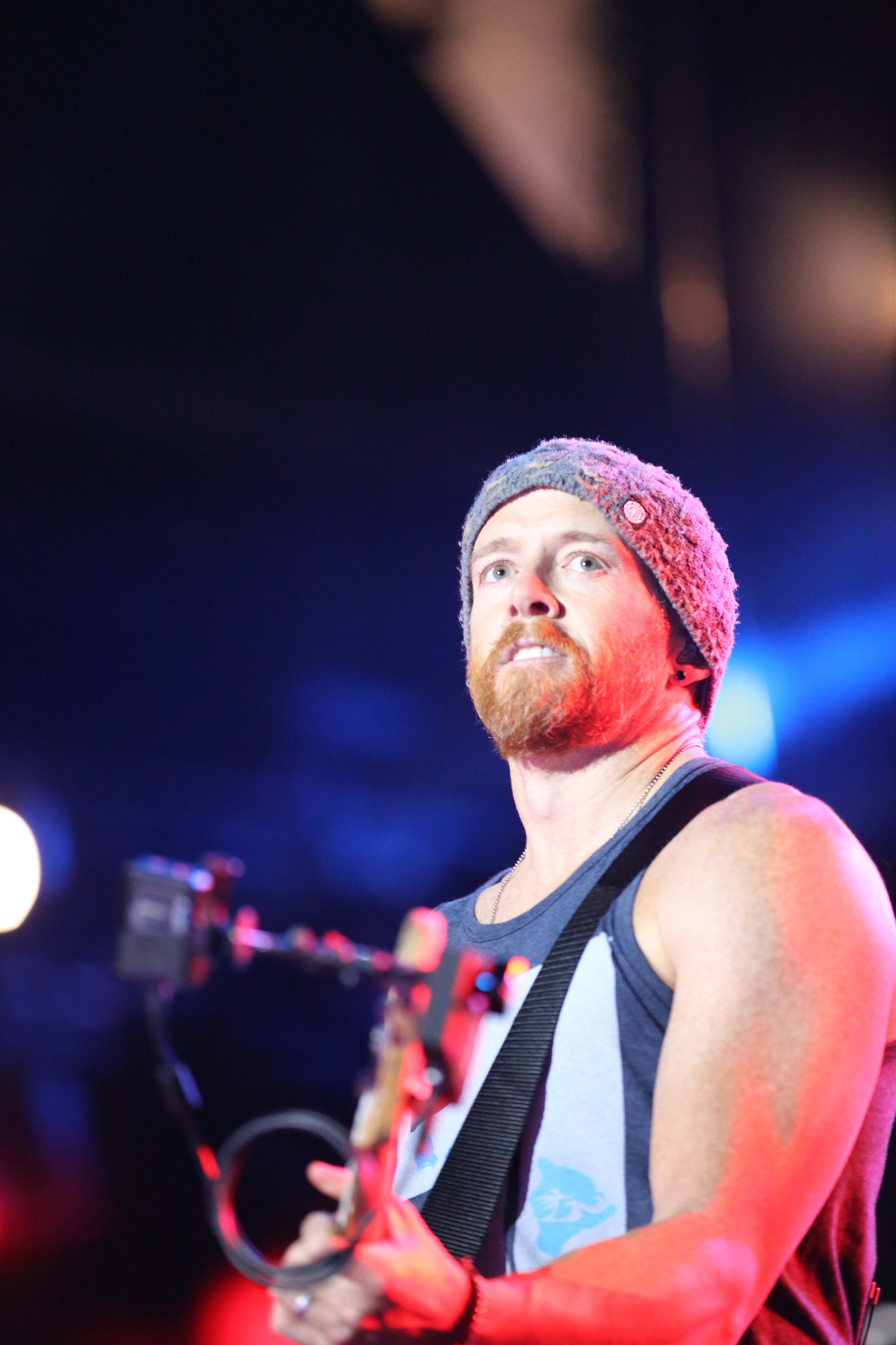 Linkin Park bei Rock am Ring 2014.